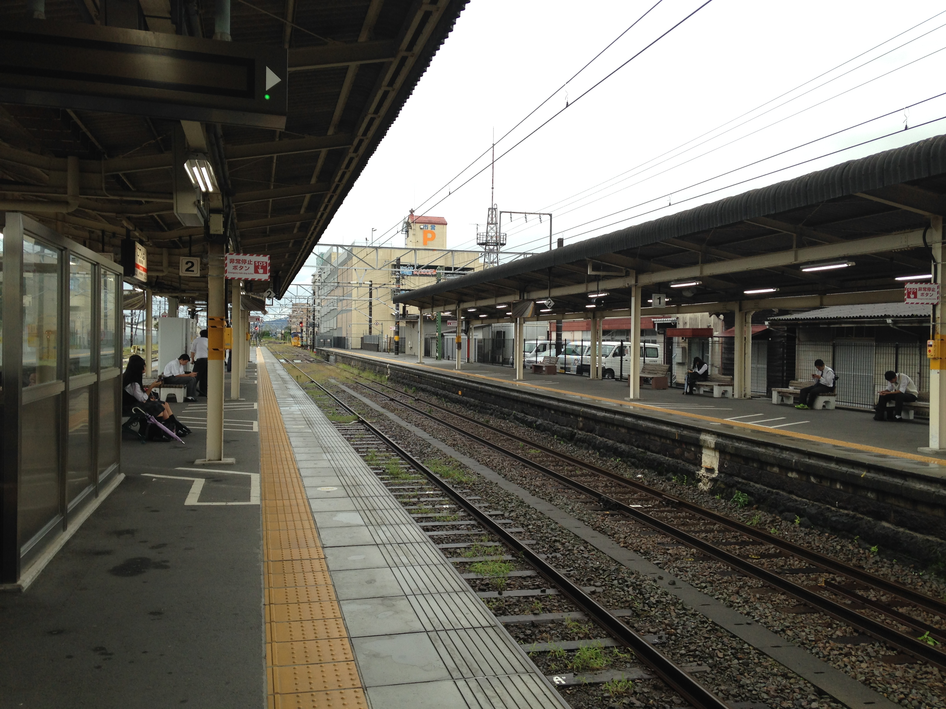 御殿場駅のホーム